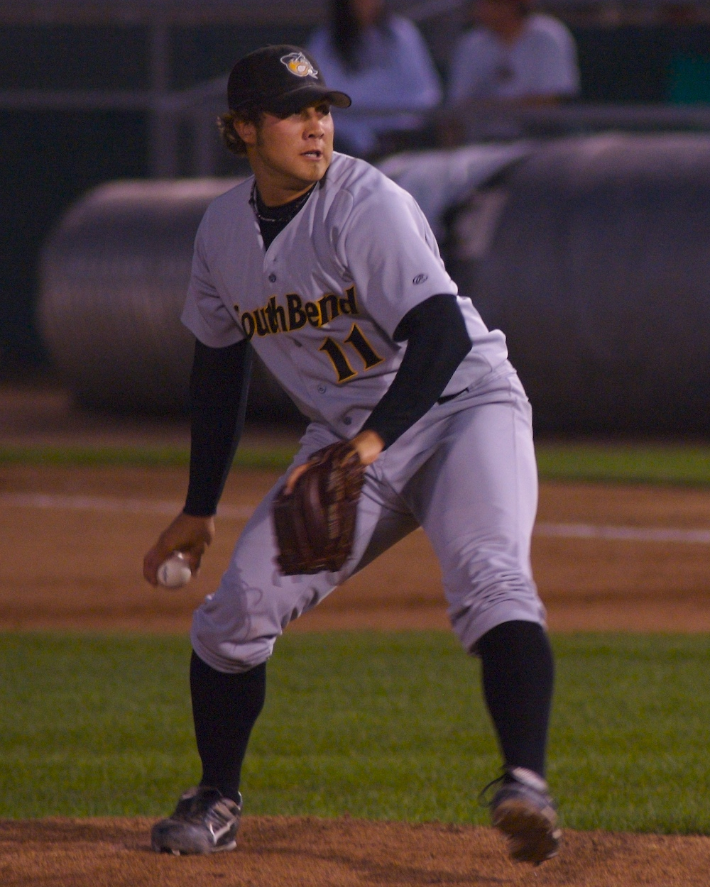 Reid Mahon